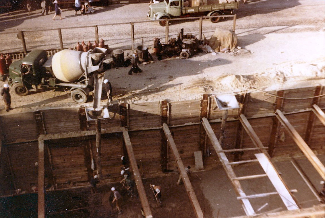 U-Bahnbau im "offenen Schacht" auf der Wandsbeker Marktstr. i Hamburg